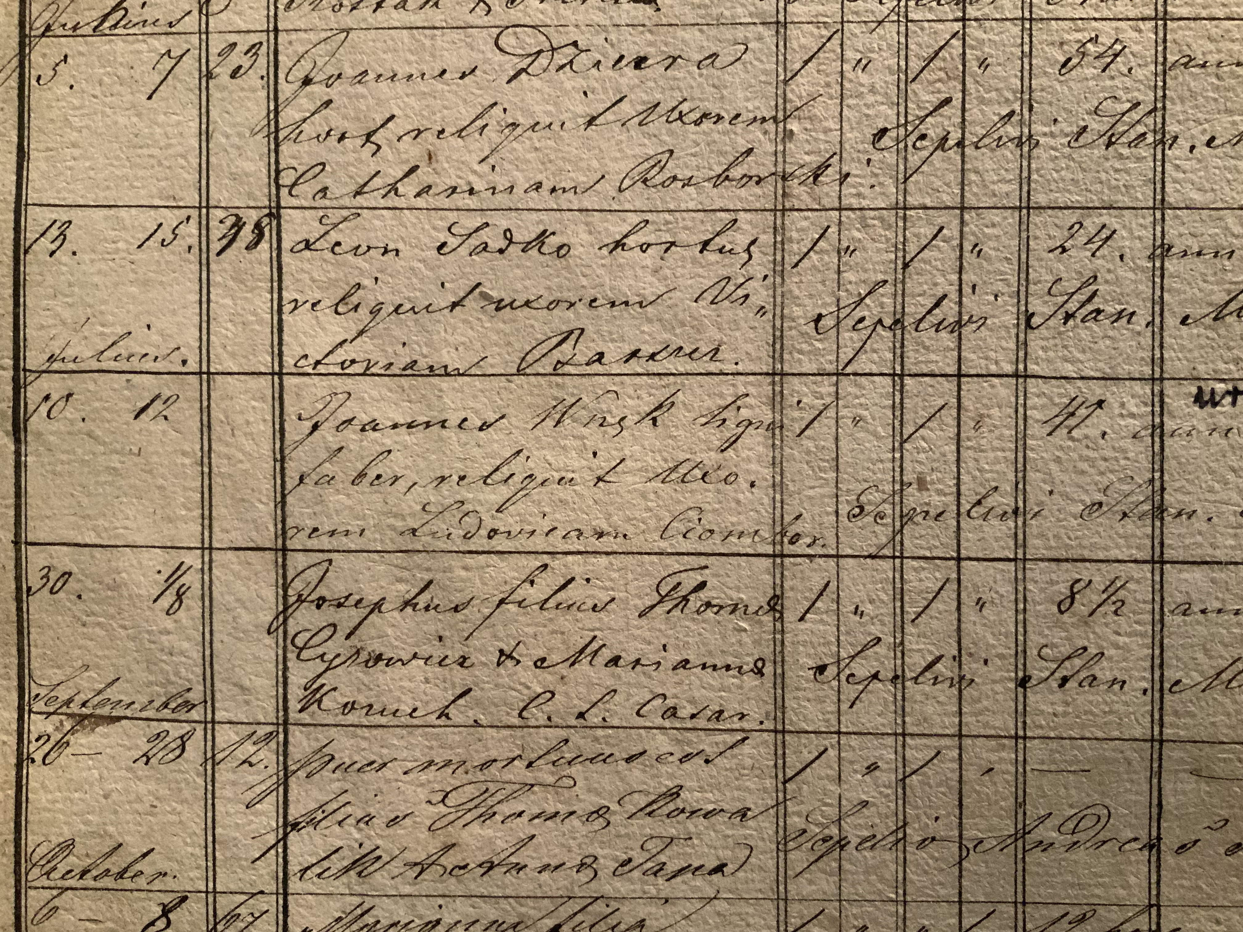 Wpis do księgi zmarłych parafii w Odporyszowie, zawierający datę śmierci (10.07.1869) i datę pogrzebu (12.07.1869) Jana Wnęka wraz z dopiskiem "faber" i "religiant".